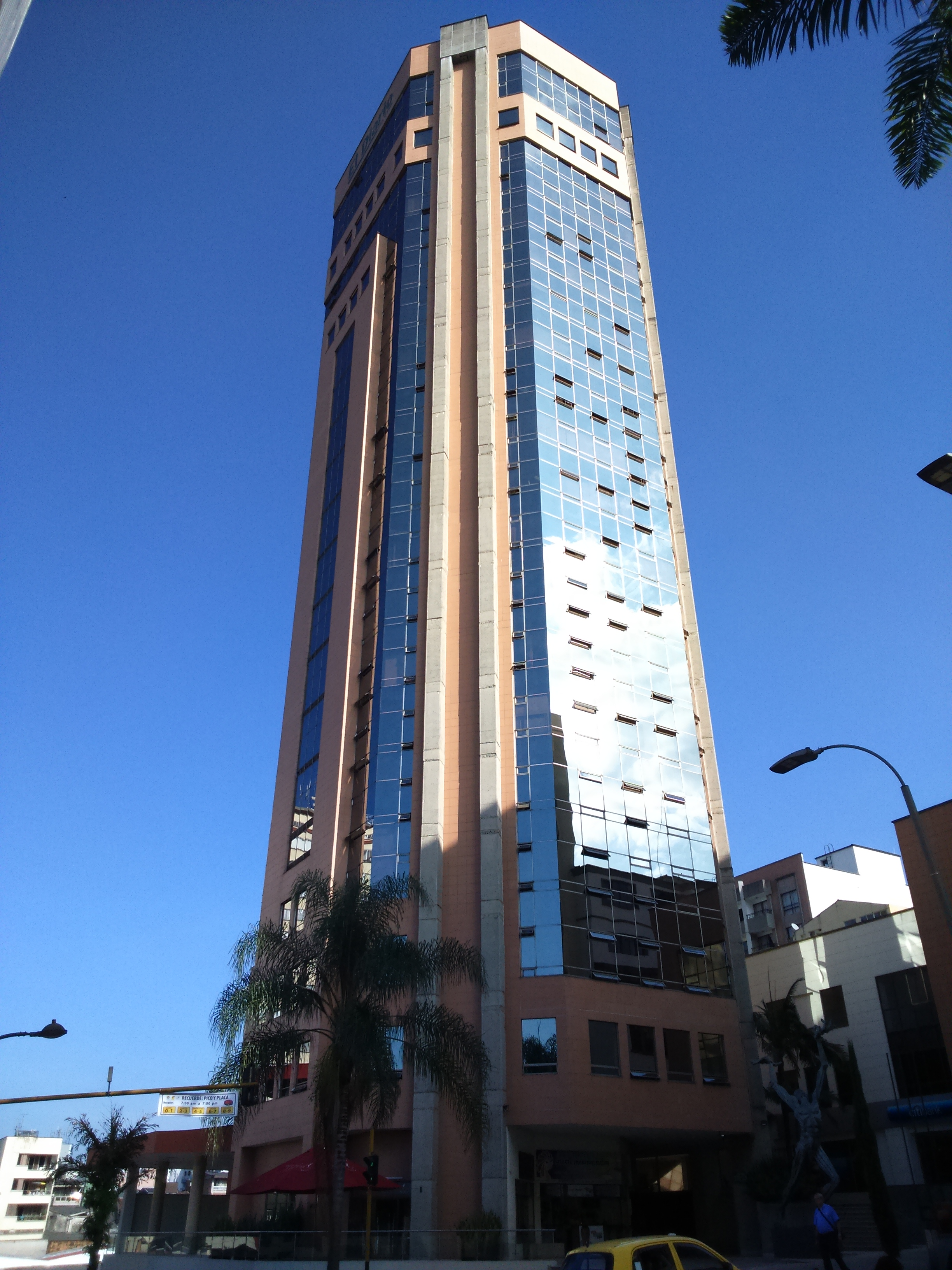 Fotografía del edificio Diario del Otún en el centro de la ciudad de Pereira.